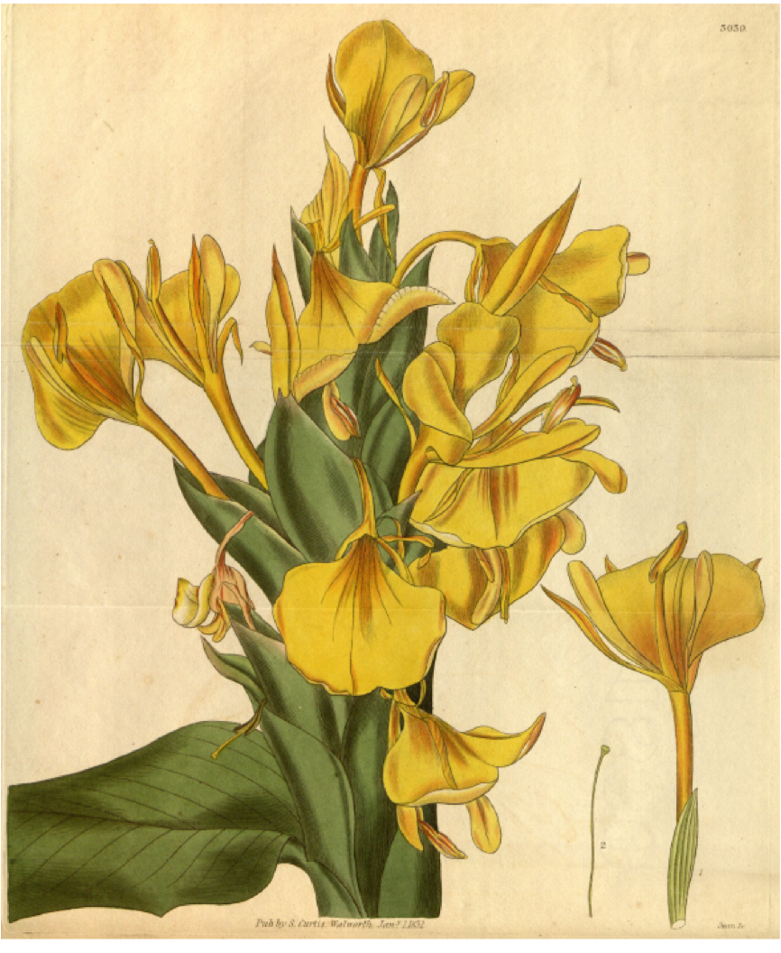 Hedychium flavum Roxb. , planche 3039 du Curtis's Botanical magazine, 1831, Vol. 5